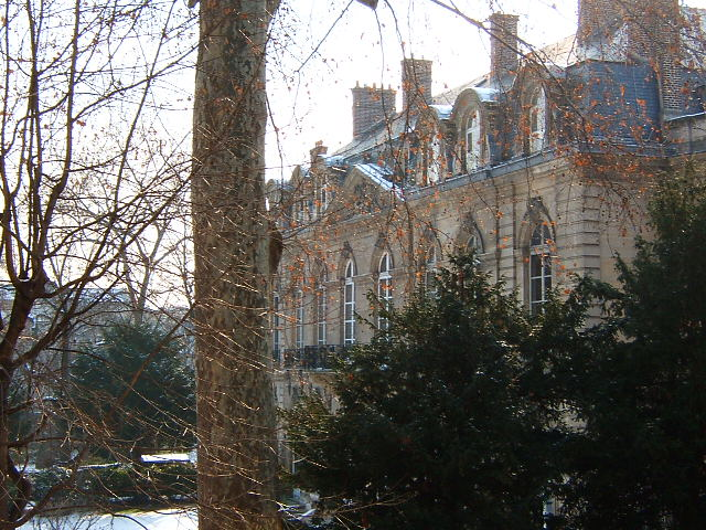 photo de l'auteur : l'hôtel de Villeroy où est logé le ministère de l'agriculture